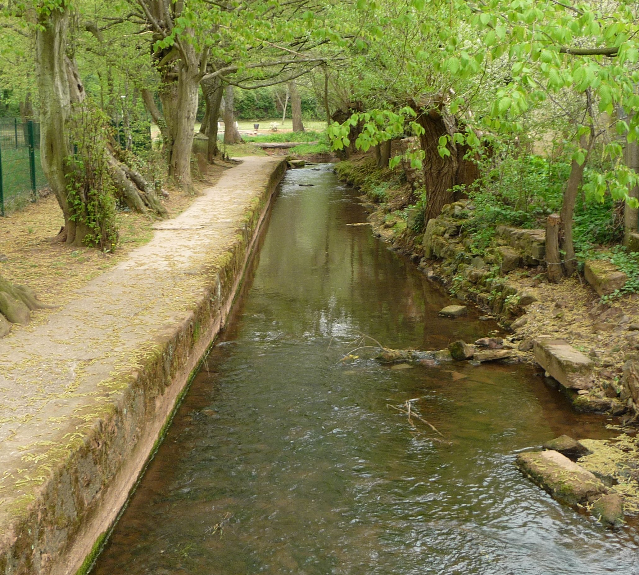 Der Lohnsbach mündet bei Winnweiler in die Alszenz.